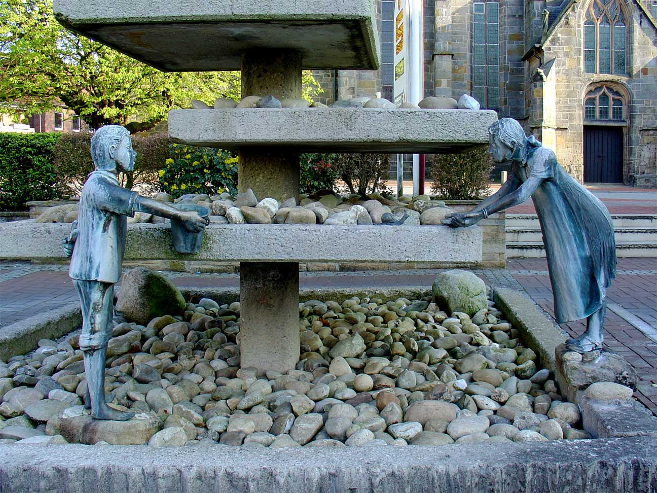 Fontein met kinderfiguren in Uelsen door Leo Janischowsky + partner (1997)